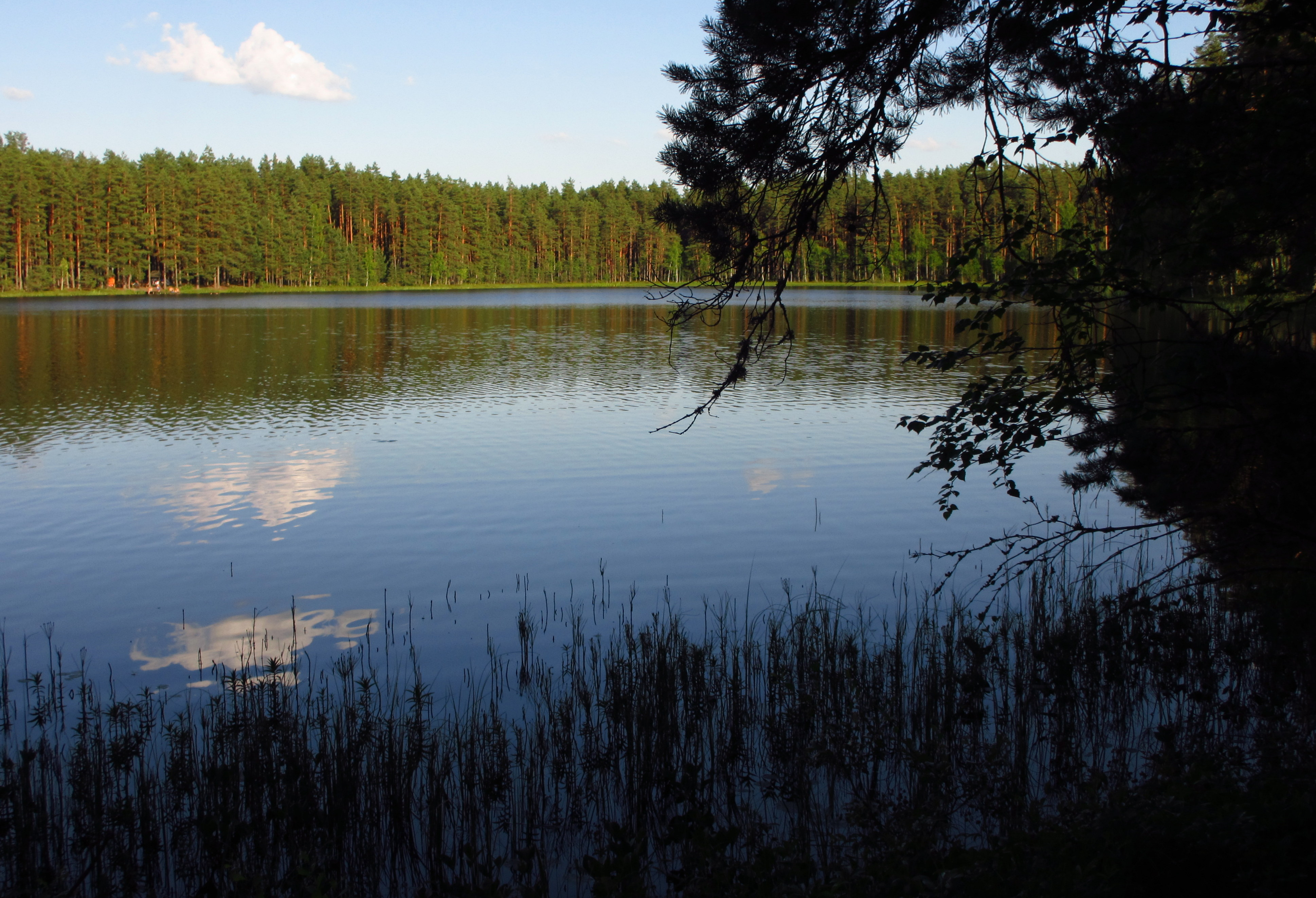 Paidra järv Võrumaal